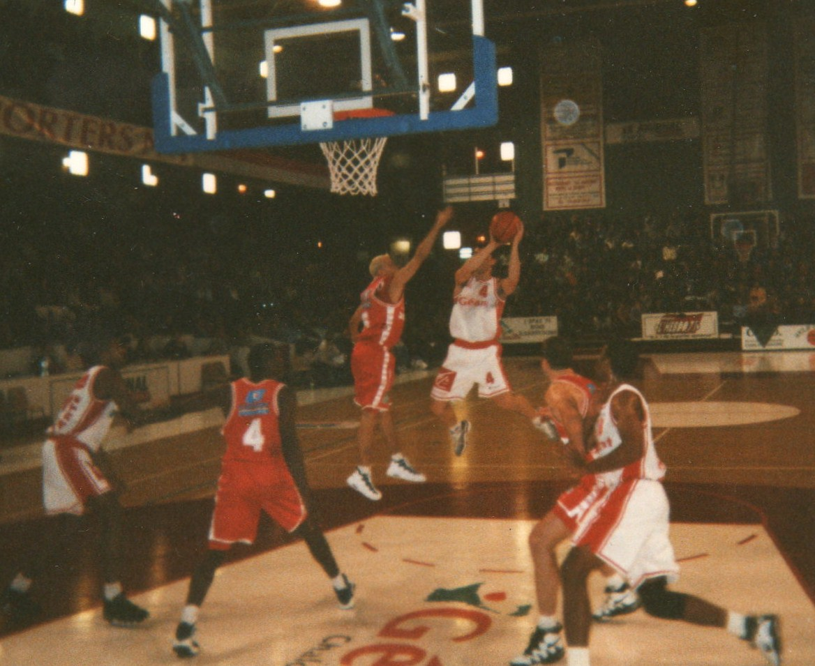 Match de Pro A entre l'Elan Chalon et le SLUC Nancy en décembre 1996